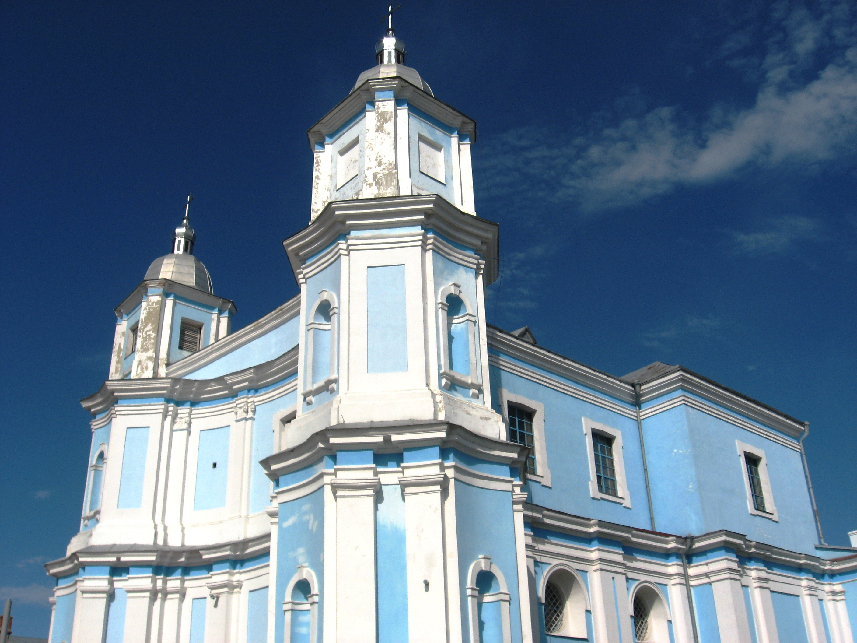 Володимир-Волинський. Кафедральний Собор Різдва Христового